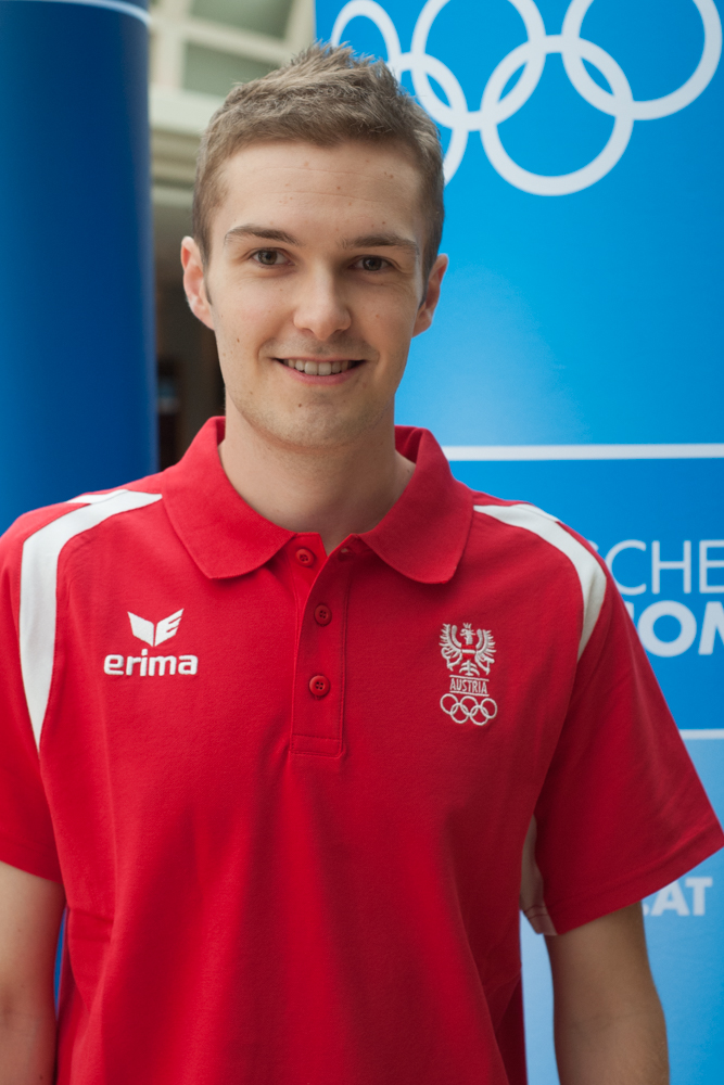 Einkleidung der Österreichischen Teilnehmer an den Olympischen Sommerspielen 2016 am 16./17. Juli 2016 in Wien. Bild zeigt Thomas Mathis.